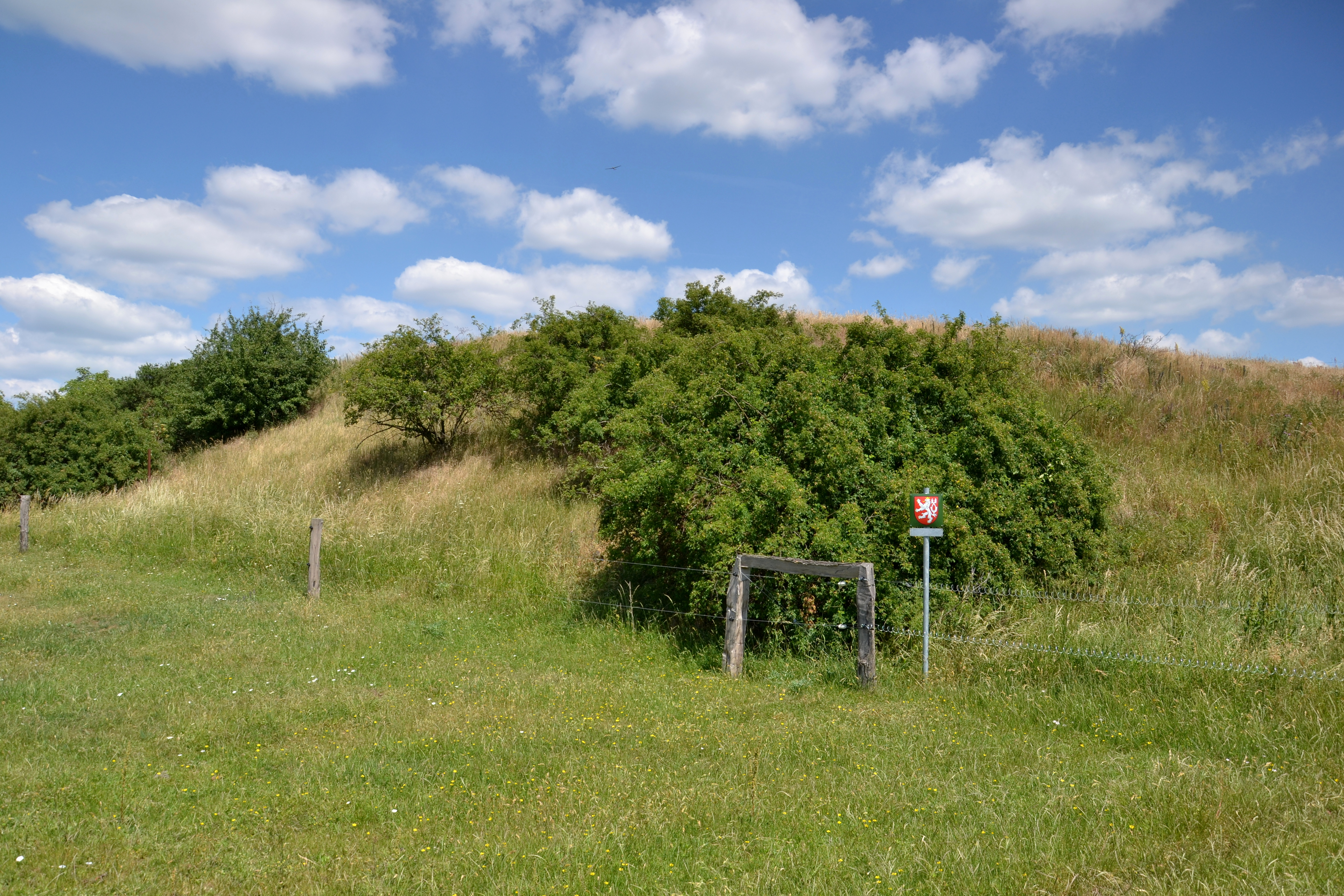 Hradec u Kadaně – čelní strana vnitřního valu